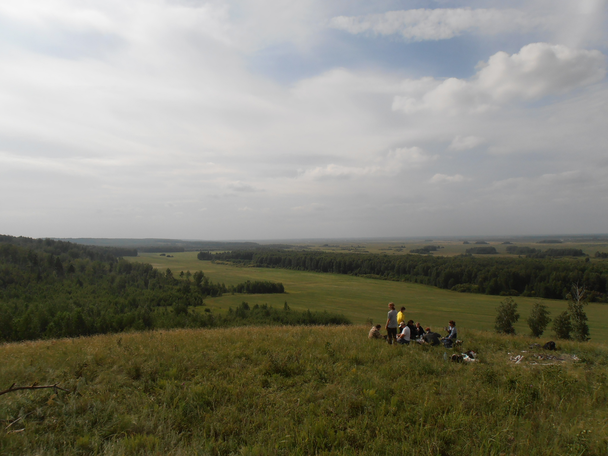 Пойма правого берега реки Исеть (Ингальская долина, Исетский район Тюменской области).